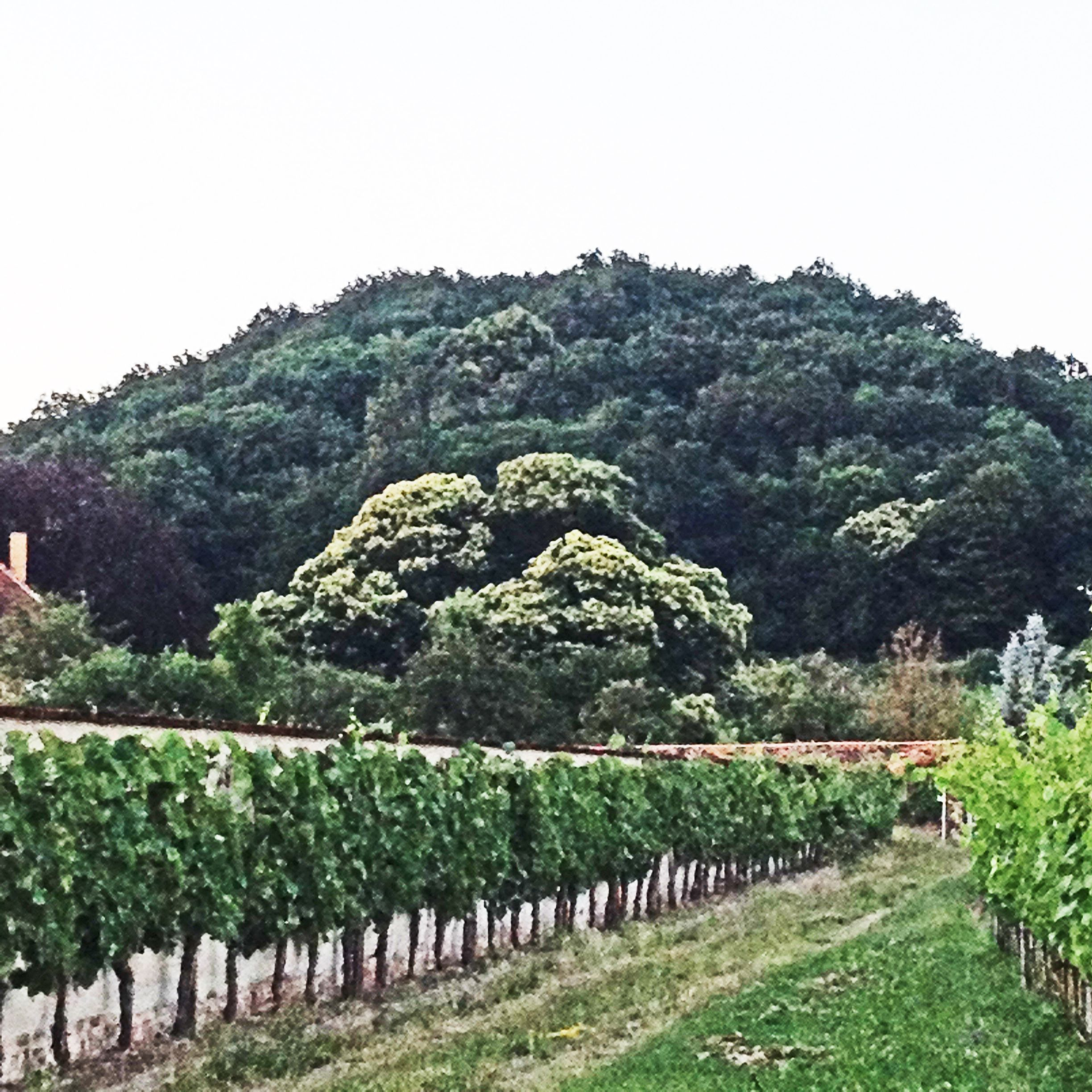 Radebeul, Naturdenkmal "Esskastanie am Haus Kynast in Radebeul-Zitzschewig", am Tag der offenen Tür der Krapenburg für den verein für denkmalpflege und neues bauen radebeul, abends vom Krapenberg aus